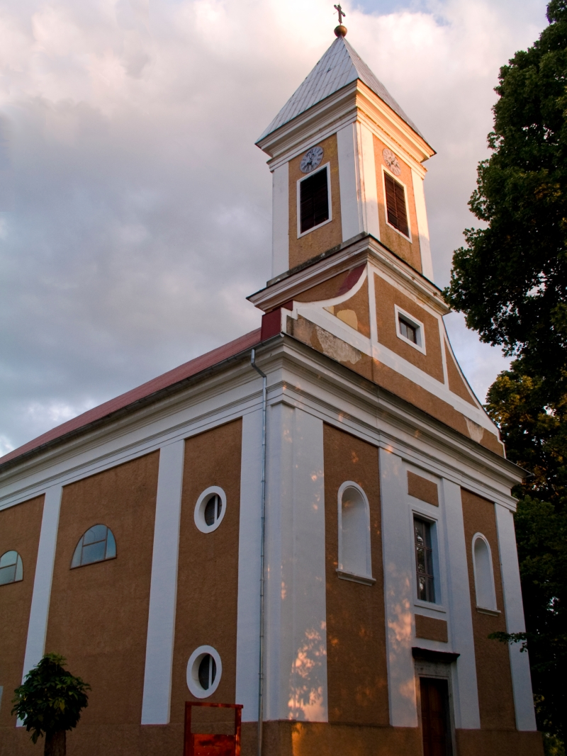 Crkva Svetog Ilije u Sincu kod Otočca